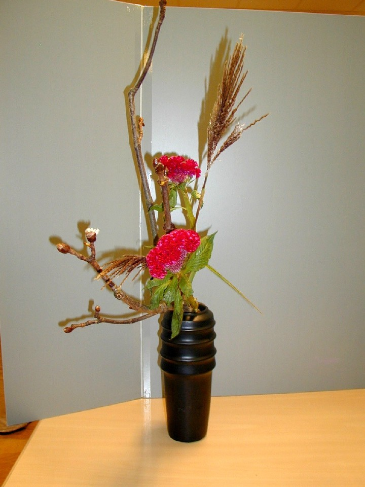 Forma Heika